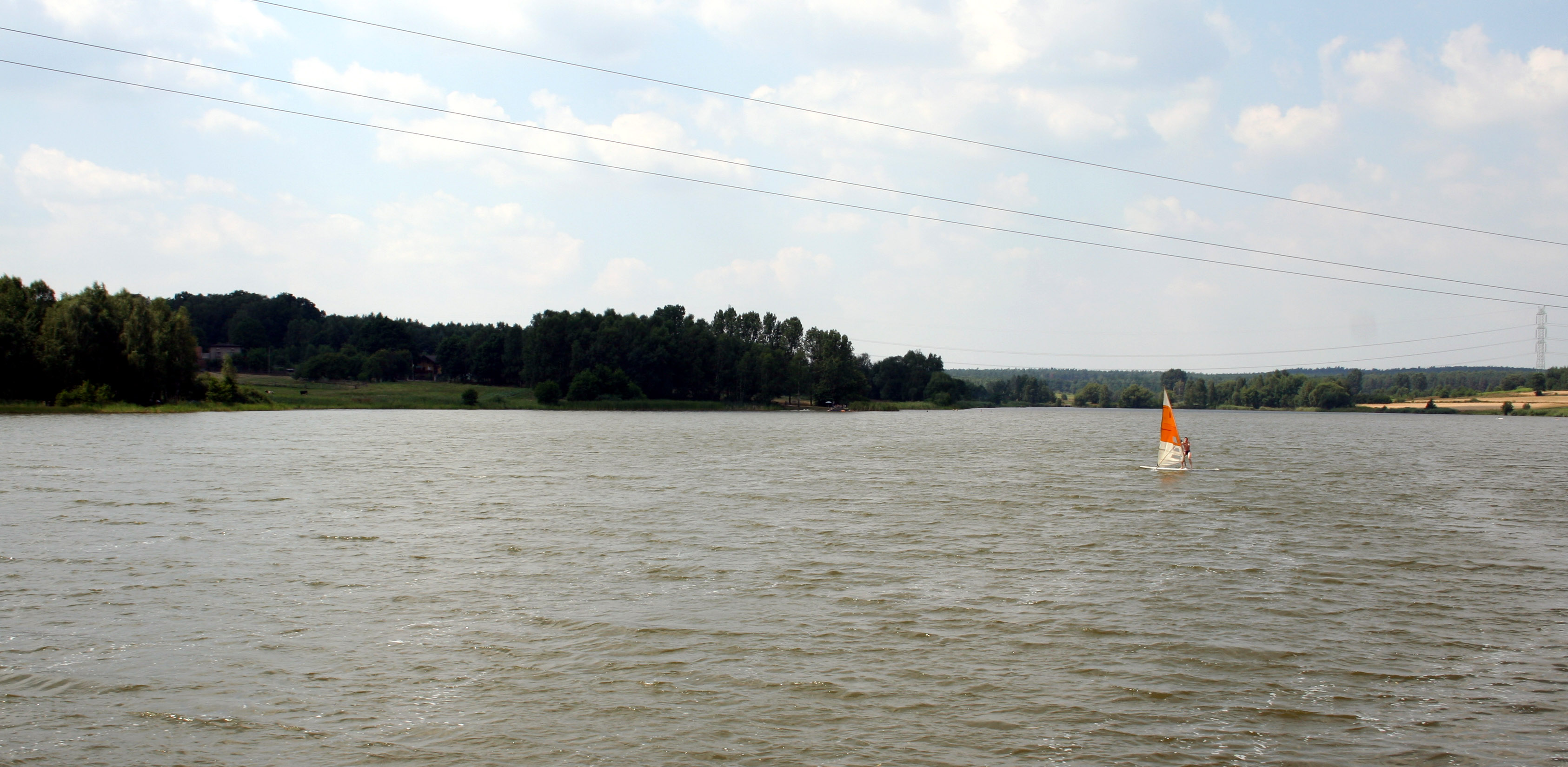 Zalew Pniowiec w Rybnicku, część Zbiornika Rybnickiego